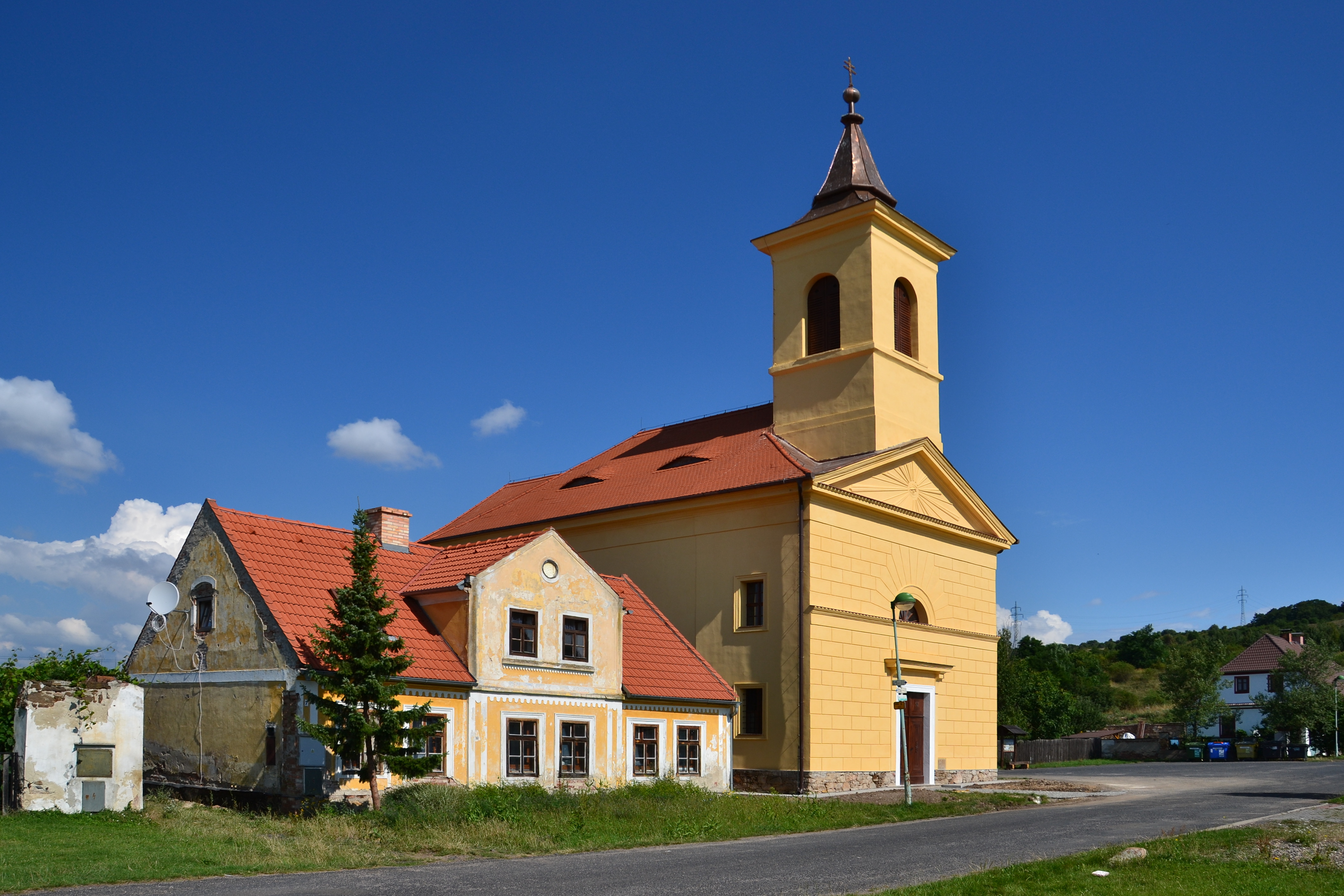 Stranná - kostel Nejsvětější Trojice z roku 1842